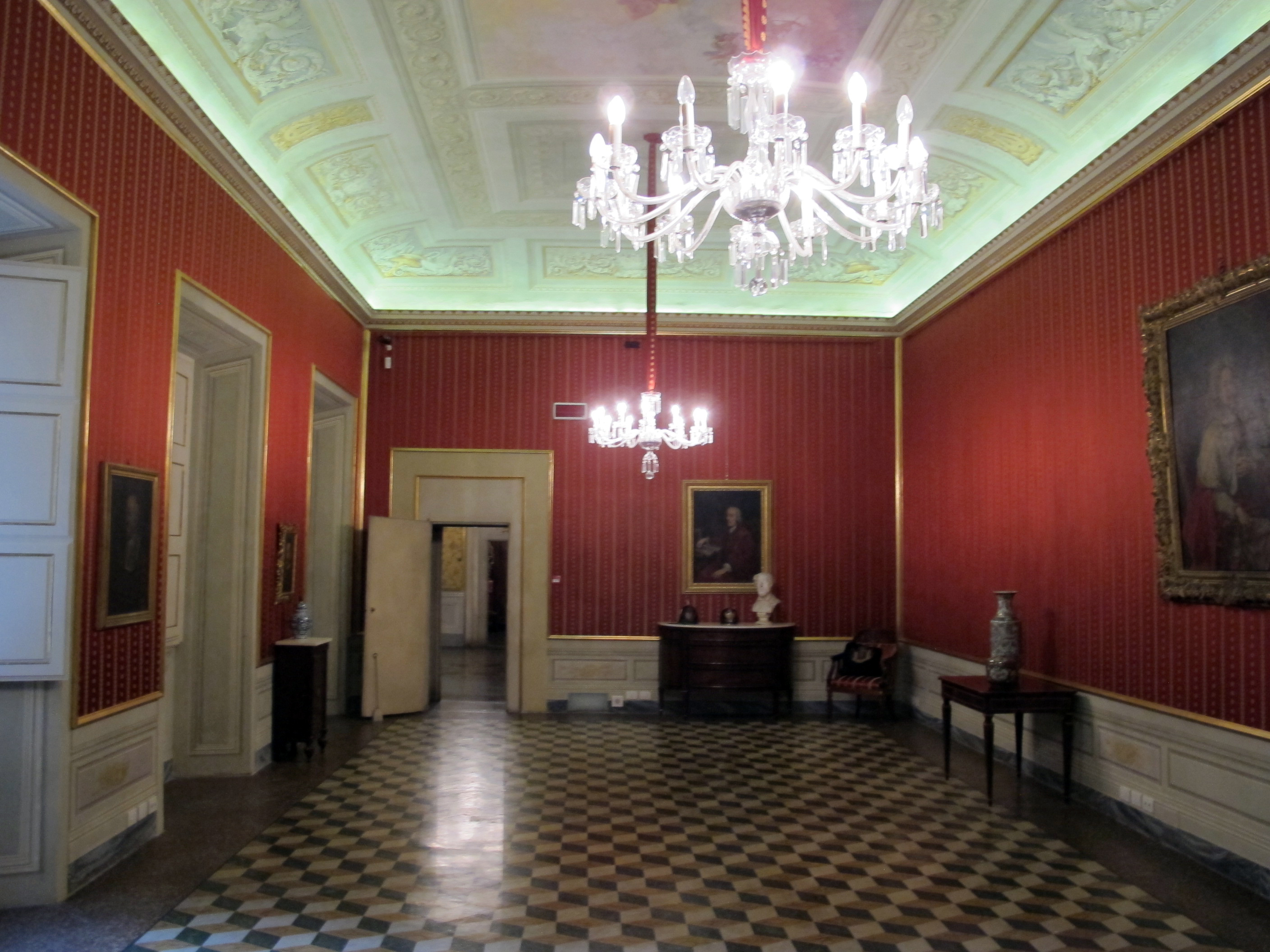 Museo di Casa Martelli - MIBAC This is a photo of a monument which is part of cultural heritage of Italy.